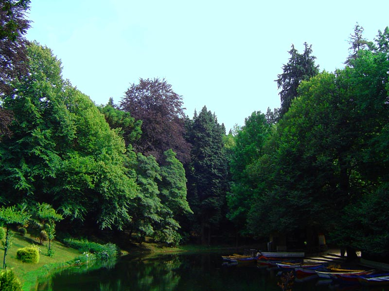 Braga, Bom Jesus do Monte. Lago grande do parque natural.